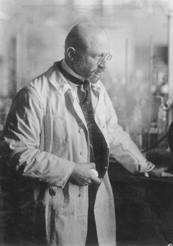 Fritz Haber Zentralbild Fritz Haber, Chemiker geb: 9.12.1868 in Breslau, gest: 29.1.1934 in Basel; 1918 Nobelpreis für Chemie. [Porträt Fritz Haber mit Bart und weißem Kittel im Labor stehend] Abgebildete Personen: Haber, Fritz Prof. Dr.: Chemiker, Nobelpreis für Chemie 1918, Deutschland (PND 118699814)